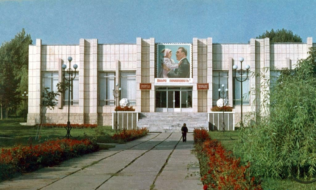 Orașul Briceni în perioada socialistă (URSS)